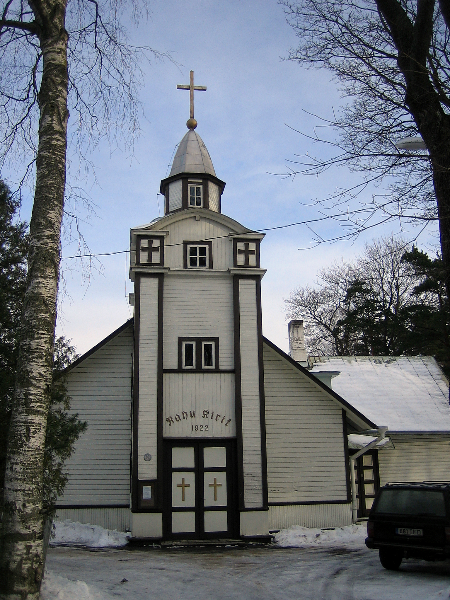 Nõmme Rahu kirik. 20. sajandi algus. Asukoht: Võsu 5. Tallinn. Arhitekt: Friedrich Wendach (†1984).